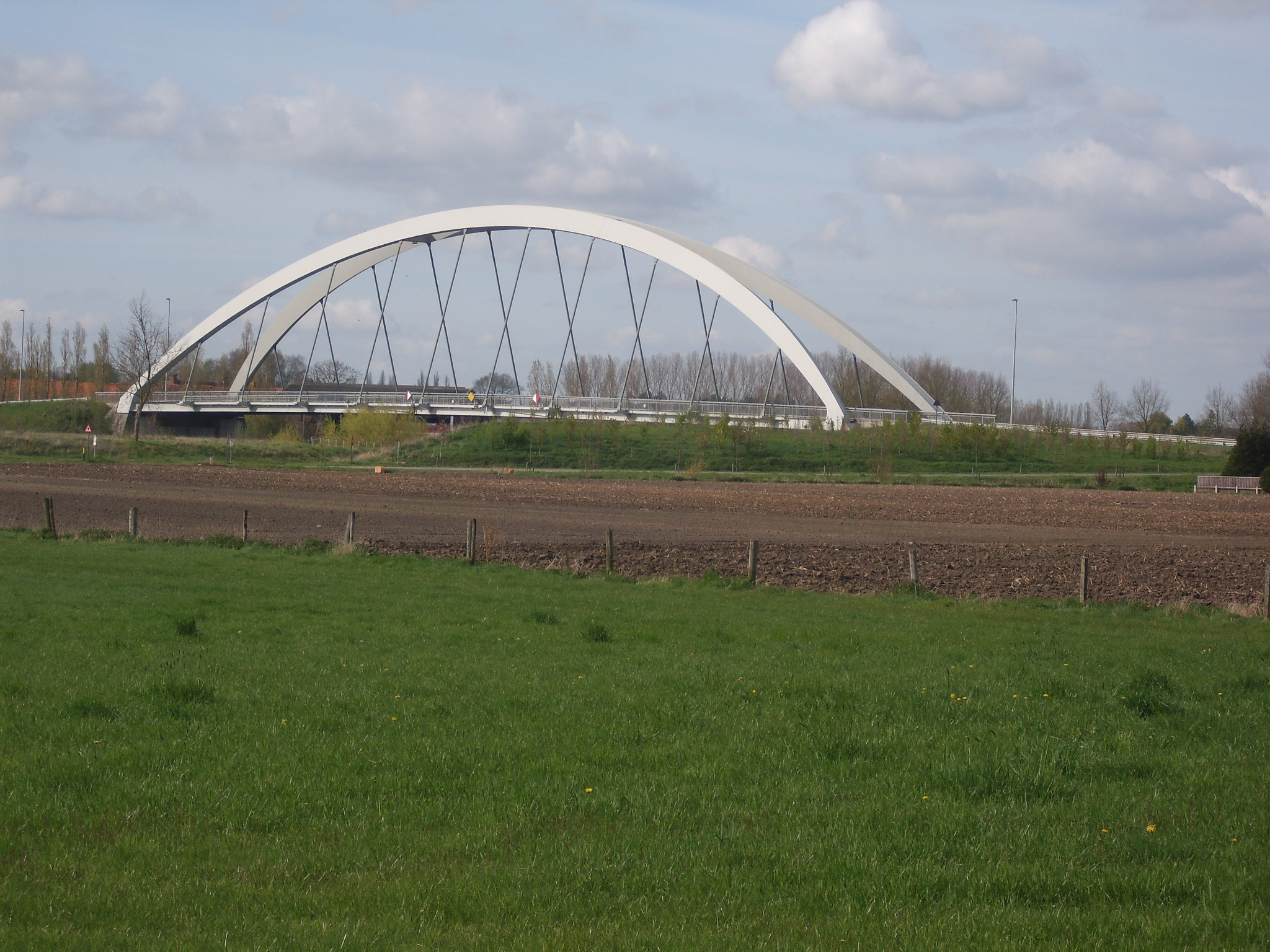 Brug over de Leie - op de weg tussen Oeselgem (West-Vlaanderen) en Olsene (Oost-Vlaanderen) - België